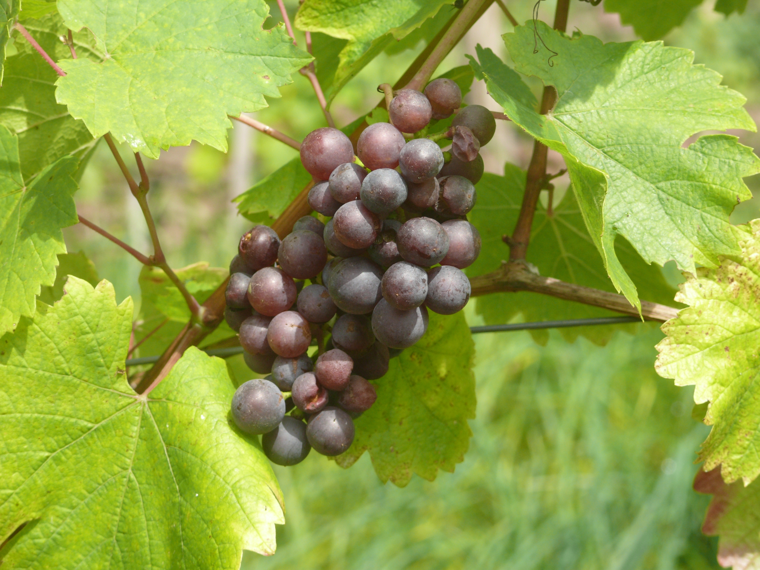 Traubensorte "Tauberschwarz", fotografiert bei Werbach